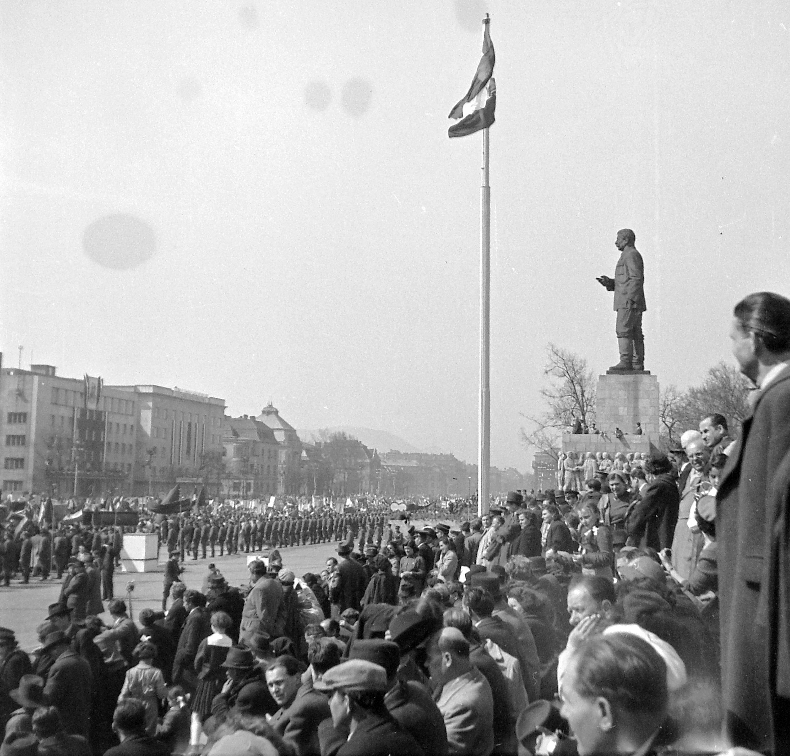 Sztálin szobor Budapesten 1955